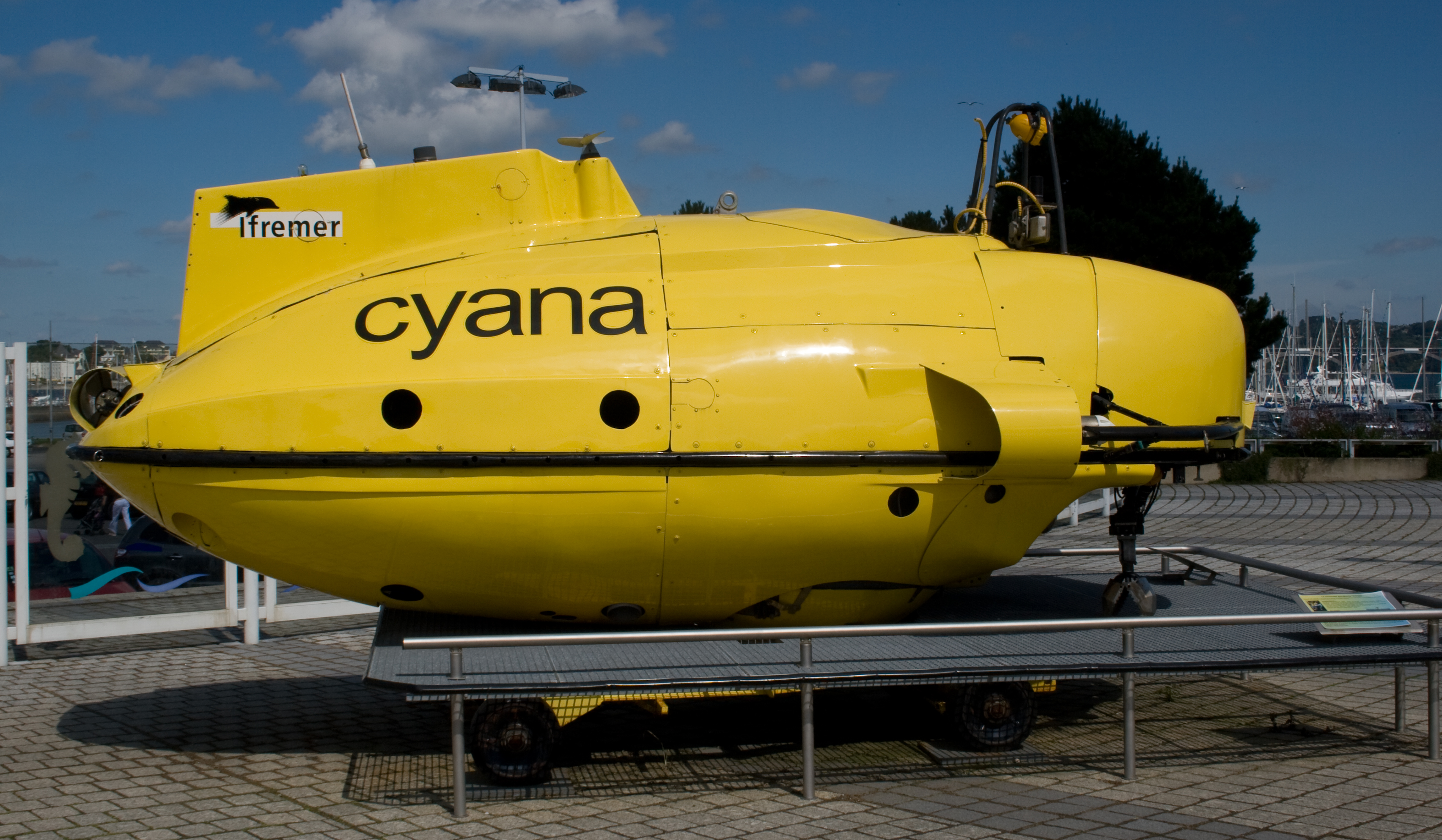 Sous-marin Cyana de l'IFREMER à Océanopolis à Brest